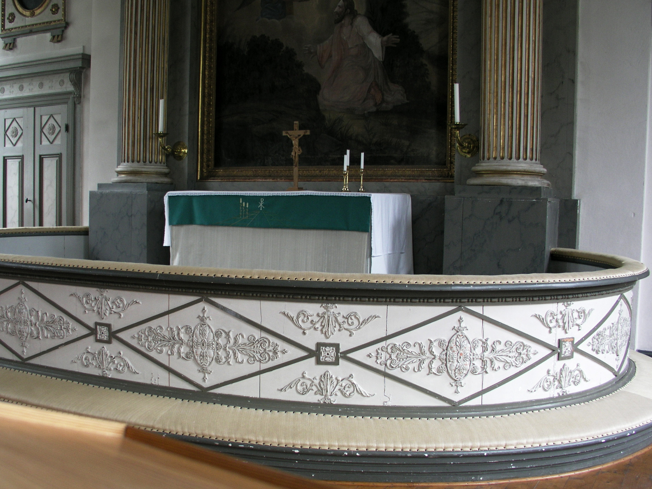 Röks kyrka, Altar